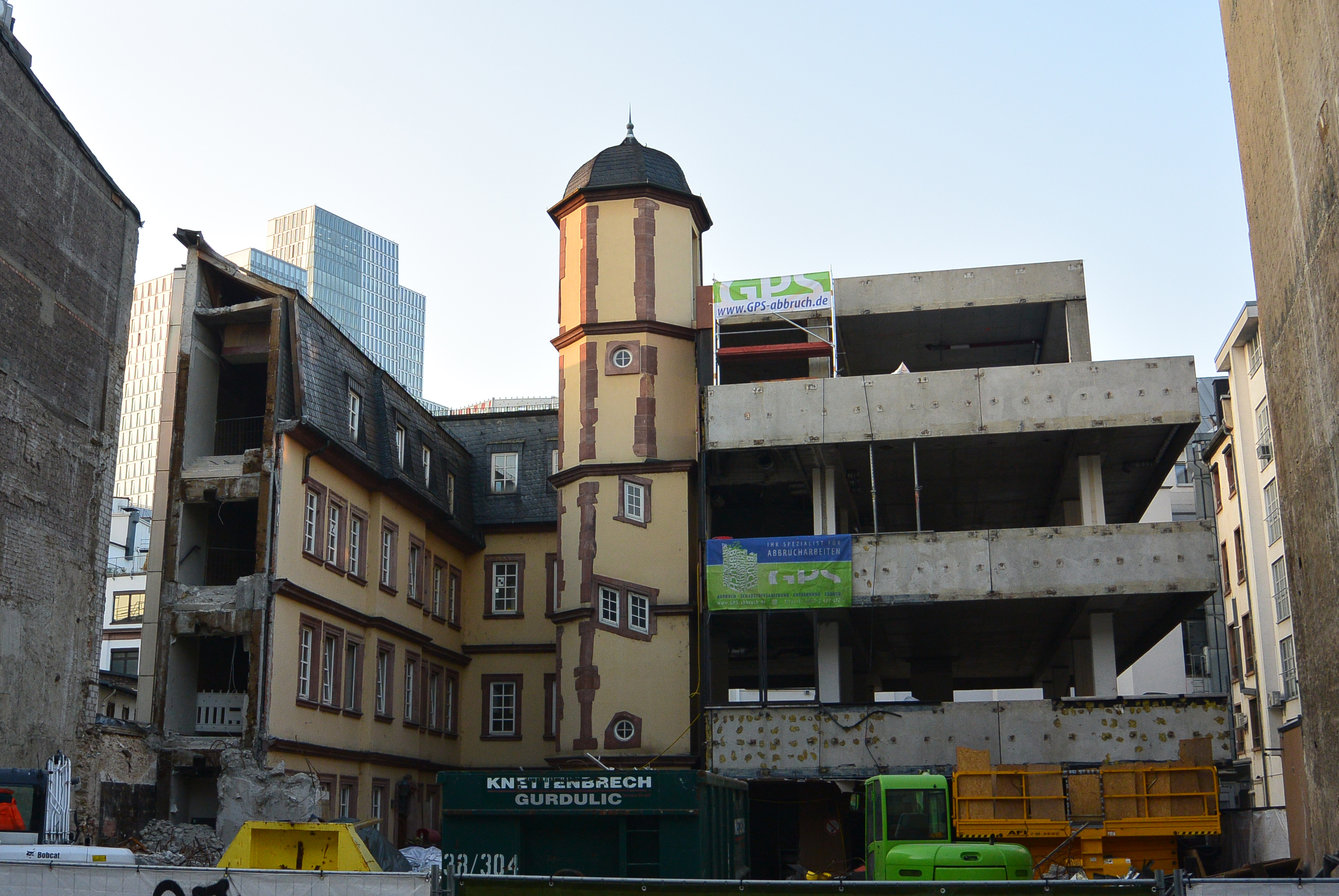 Rest des Schönborner Hofs in der Töngesgasse, sichtbar nach Abriss des Vorderhauses